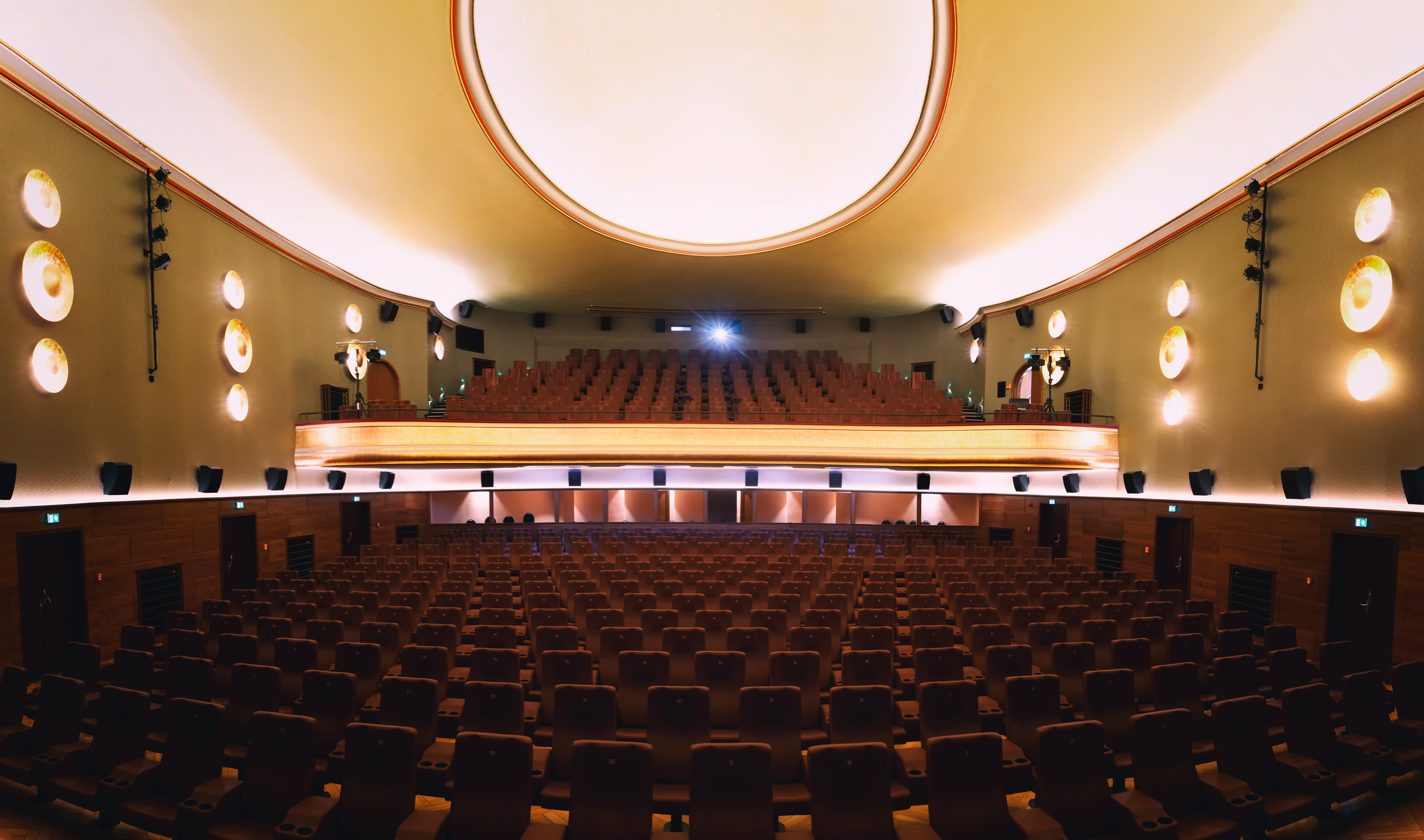 Foto: Jacob Waak